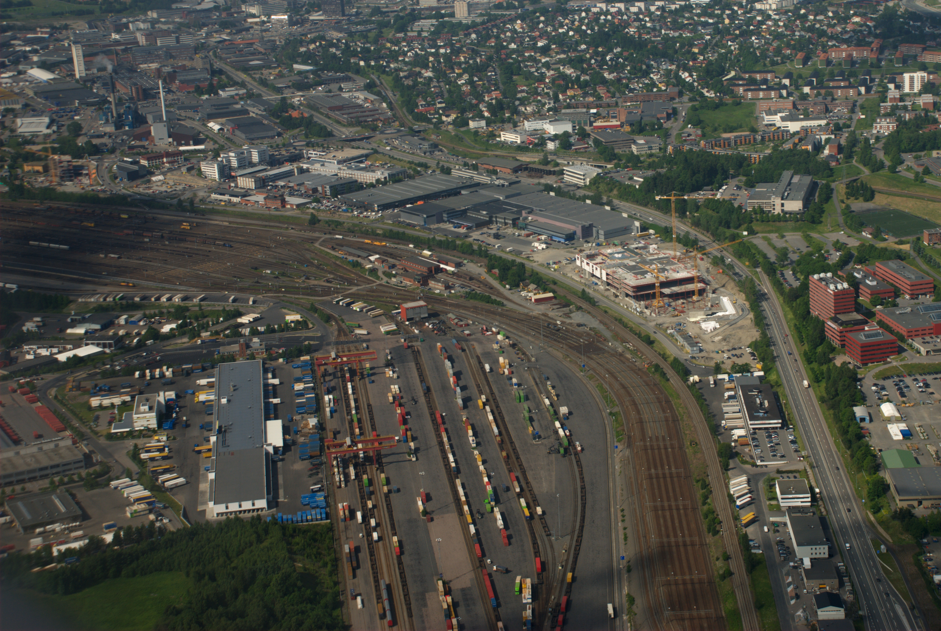 Alnabru godsterminal